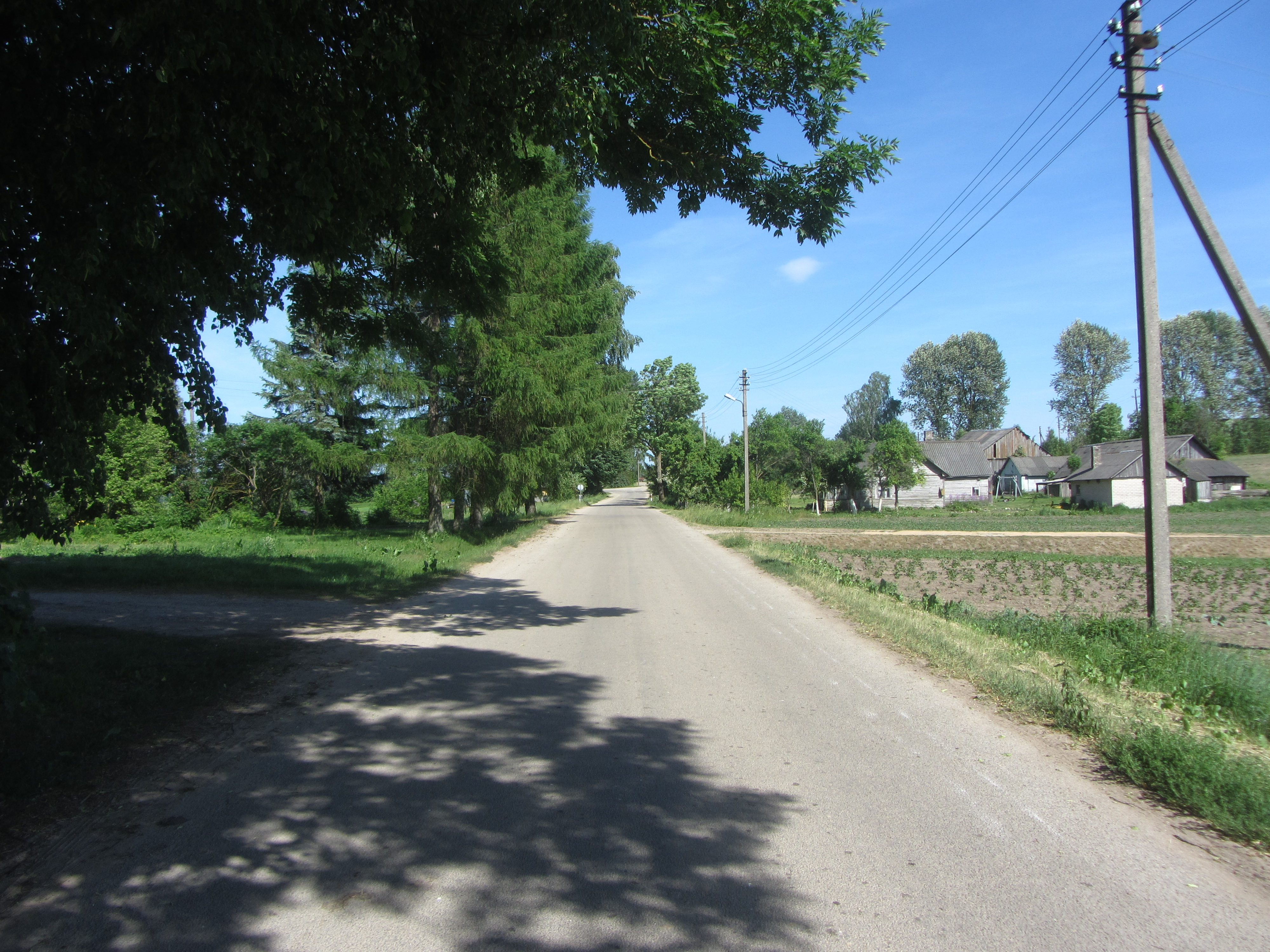 Bučiūnai, Lithuania